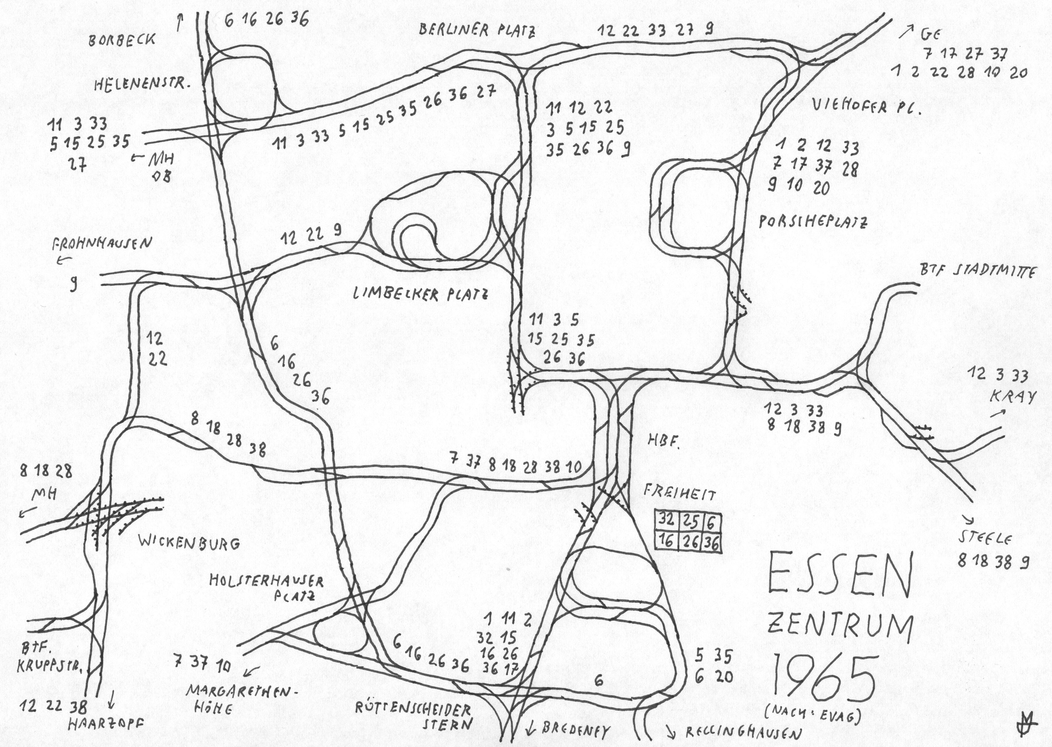 Gleisplan der Straßenbahn Essen 1965 (Zentralbereich)